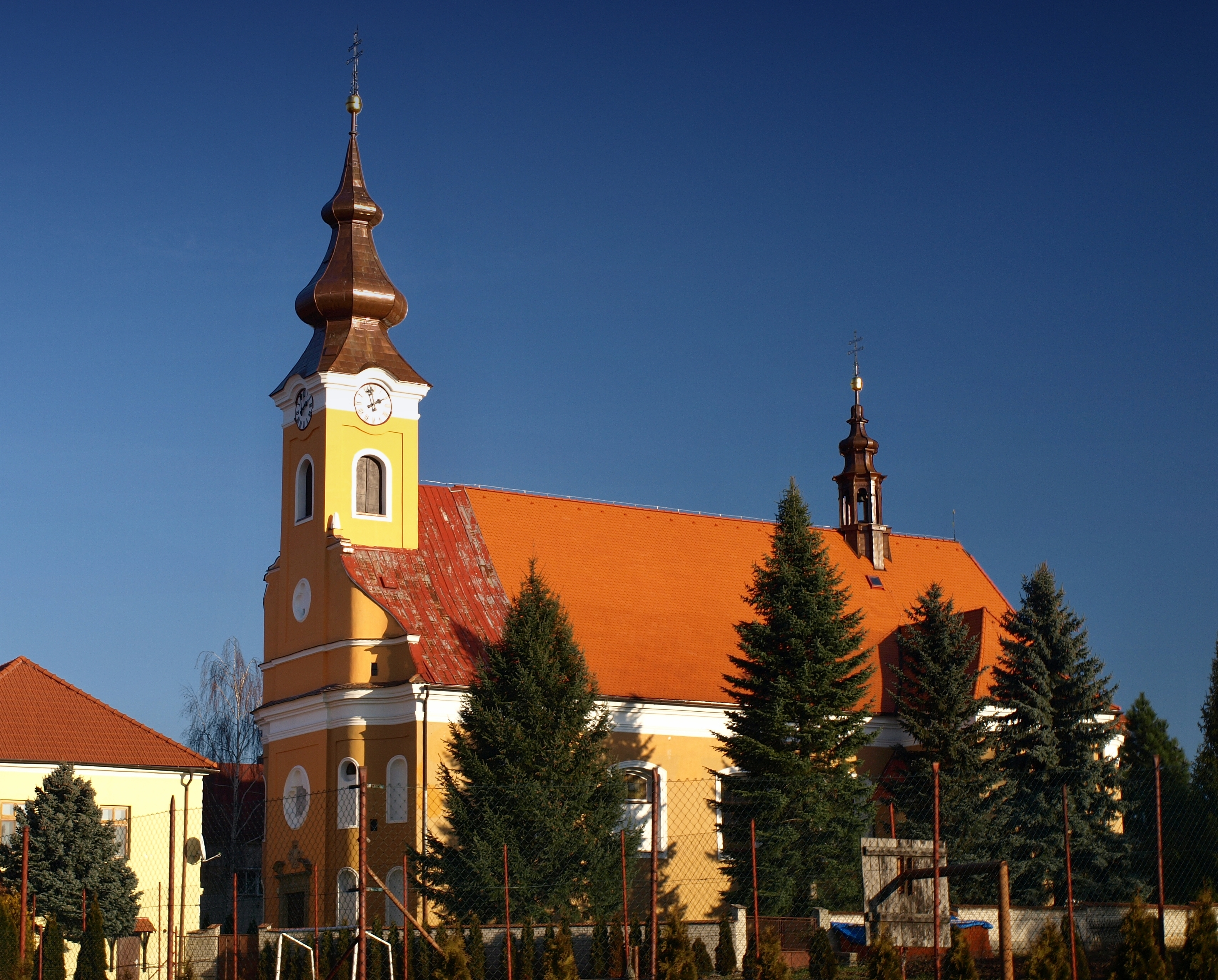 Kostel svatého Havla, Kostelní, Dřevohostice.